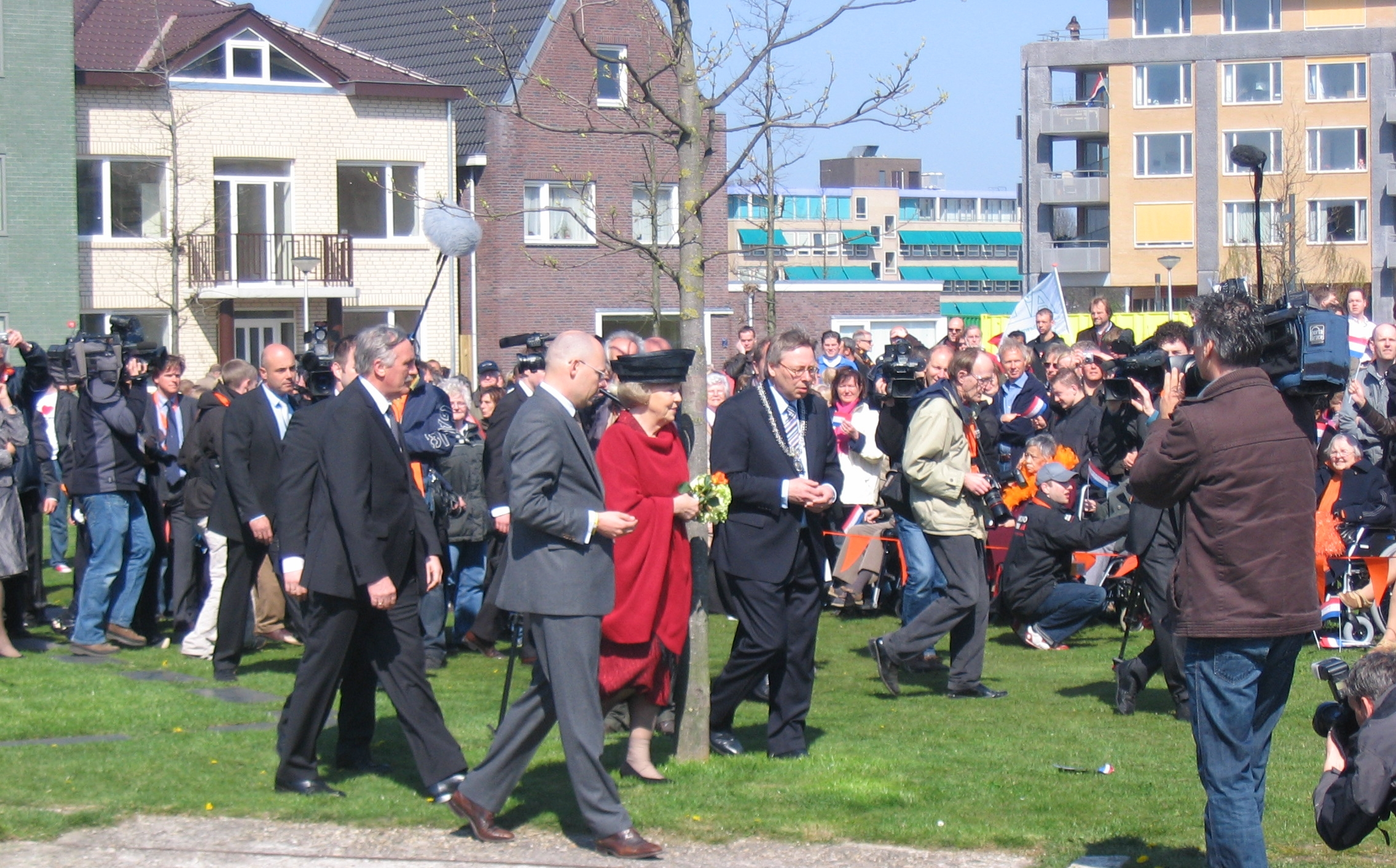 Koningin Beatrix is aanwezig in de hernieuwde wijk Roombeek, en opent het cultuurcentrum Het Rozendaal. Rechts van haar burgemeester Peter den Oudsten.